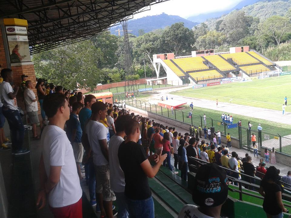 Hinchas del Alianza Petrolera en Estadio Álvaro Gómez Hurtado de Floridablanca